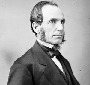 Peter Lawson, M.P., (Norfolk S.)